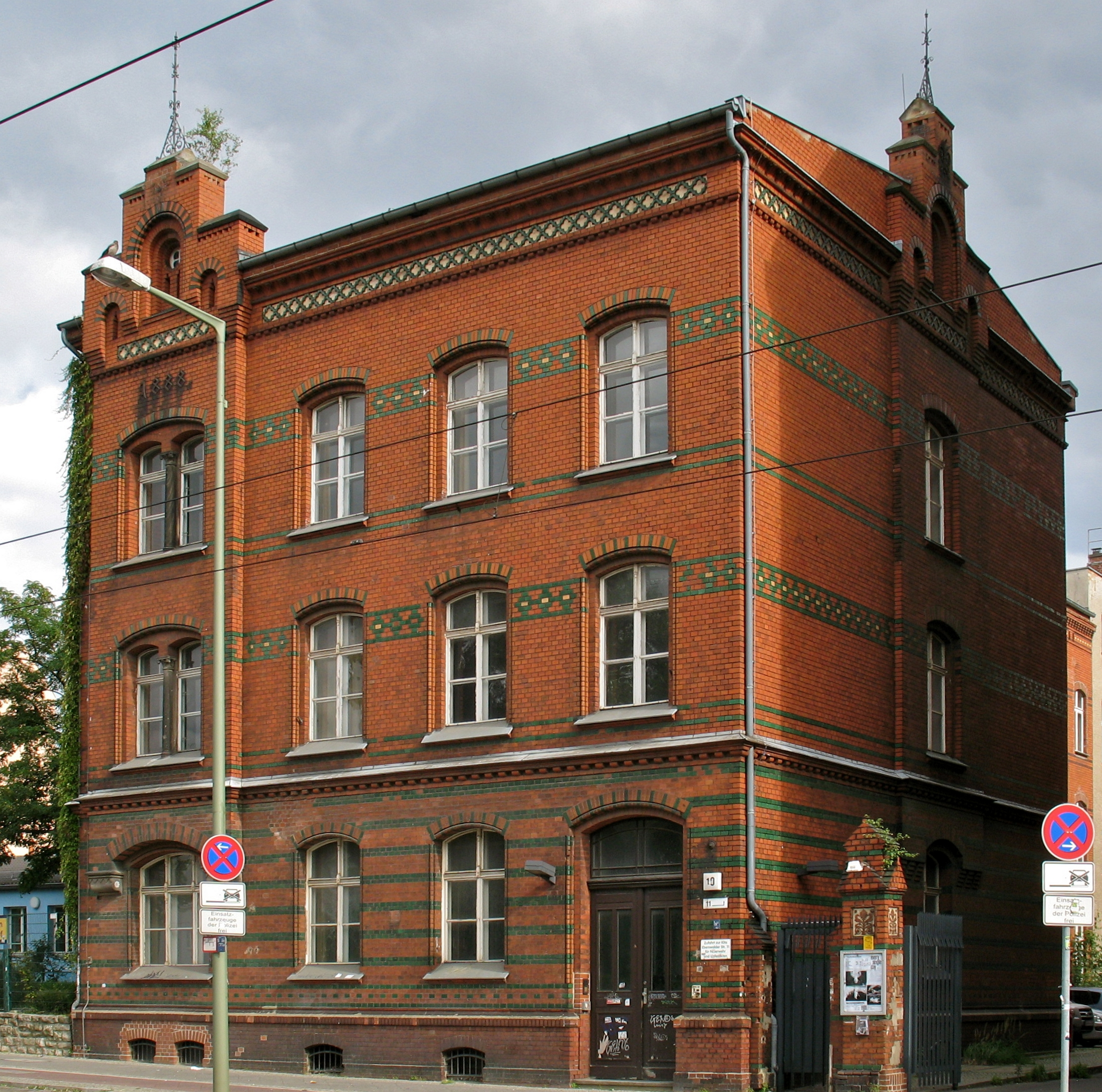 Ehemaliges Lehrerwohnhaus in der Eberswalder Straße. Denkmalgeschützter Bereich mit Turnhalle, erbaut 1888/89 nach Hermann Blankenstein.